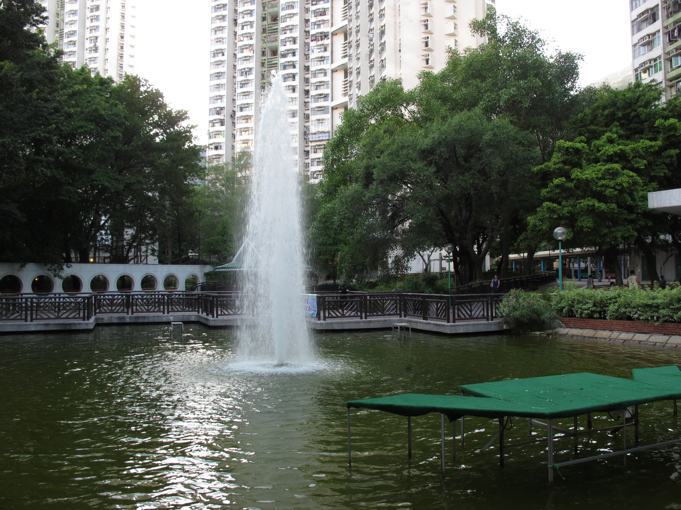 Leung King Estate Pond